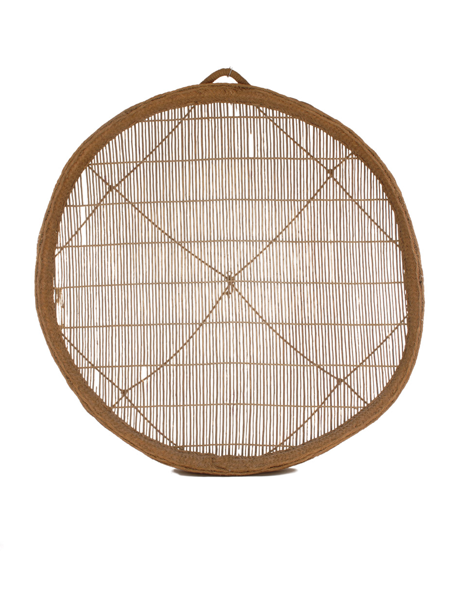 Fotografies dels objectes de l'exposició permanent de la sala "Secà i Muntanya" del Museu Valencià d'Etnologia - Fotografies de Mateo Gamon. Garbell per a xufes. Horta de València.